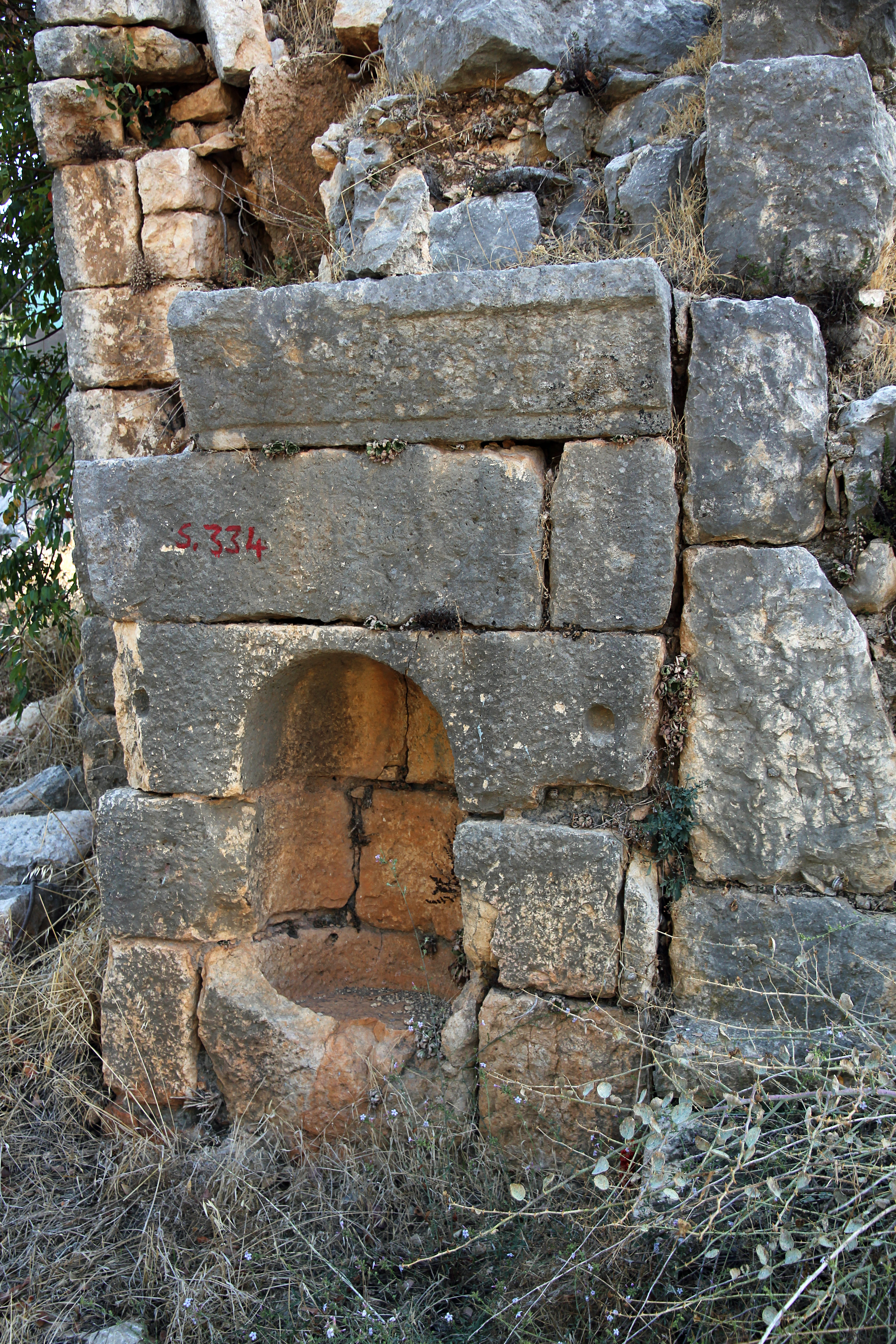 Kirche von Hasanaliler bei Silifke, Südtürkei, Kolymbion (Weihwasserbecken)